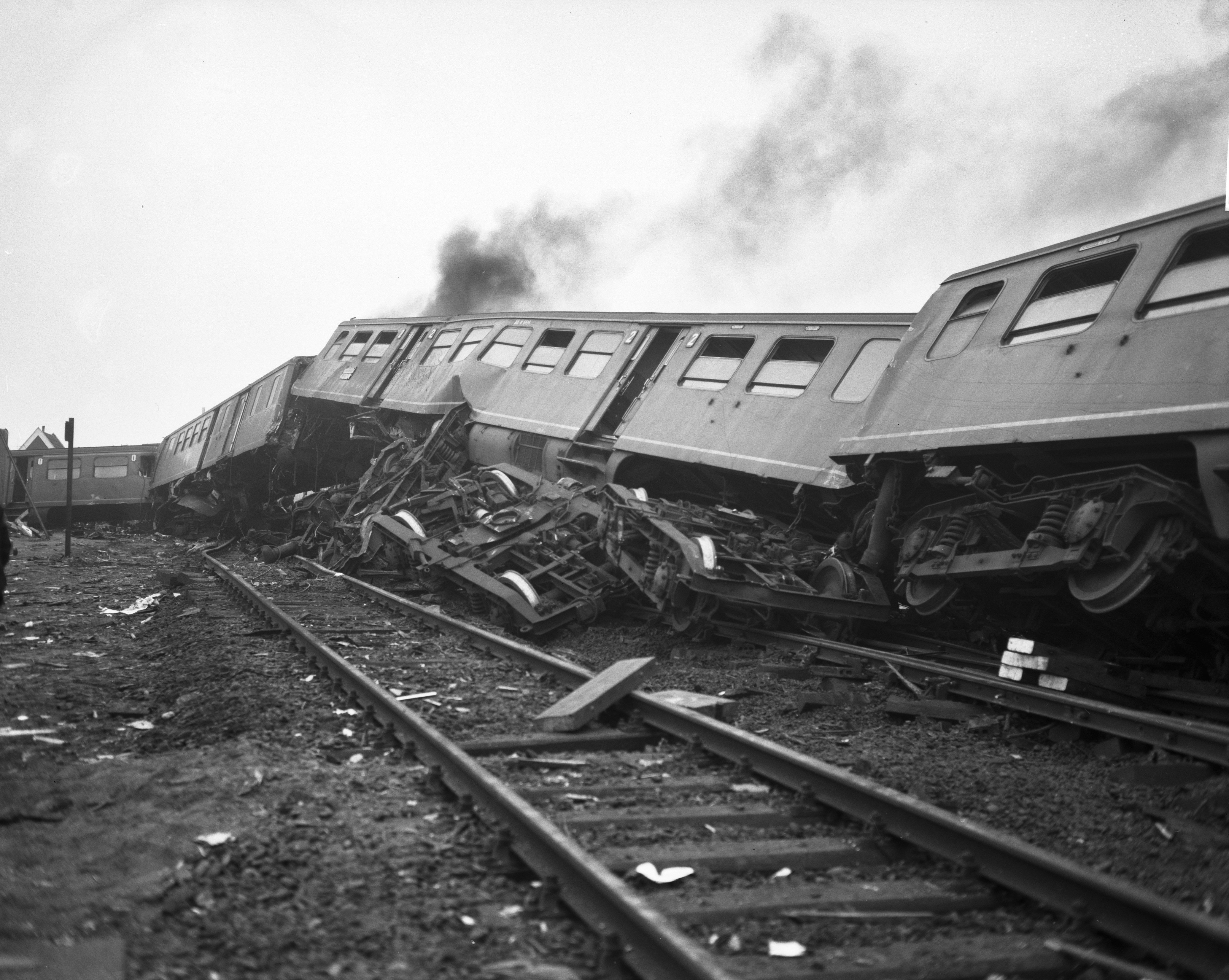 Collectie / Archief : Fotocollectie Anefo Reportage / Serie : Treinramp bij Harmelen Beschrijving : Overzicht van de ravage Annotatie : Door een menselijke fout botsten bij Harmelen de sneltrein Utrecht-Rotterdam tegen de stoptrein Rotterdam-Amsterdam. Er vielen 93 doden Datum : 8 januari 1962 Locatie : Harmelen, Utrecht (provincie) Trefwoorden : overzichten, treinen, treinrampen Fotograaf : Bilsen, Joop van / Anefo, [onbekend] Auteursrechthebbende : Nationaal Archief Materiaalsoort : Negatief (zwart/wit) Nummer archiefinventaris : bekijk toegang 2.24.01.04 Bestanddeelnummer : 913-3805